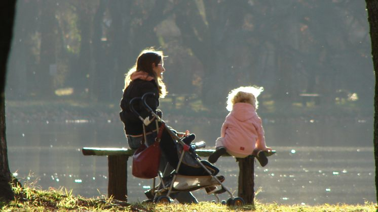 Cabellos de Angel